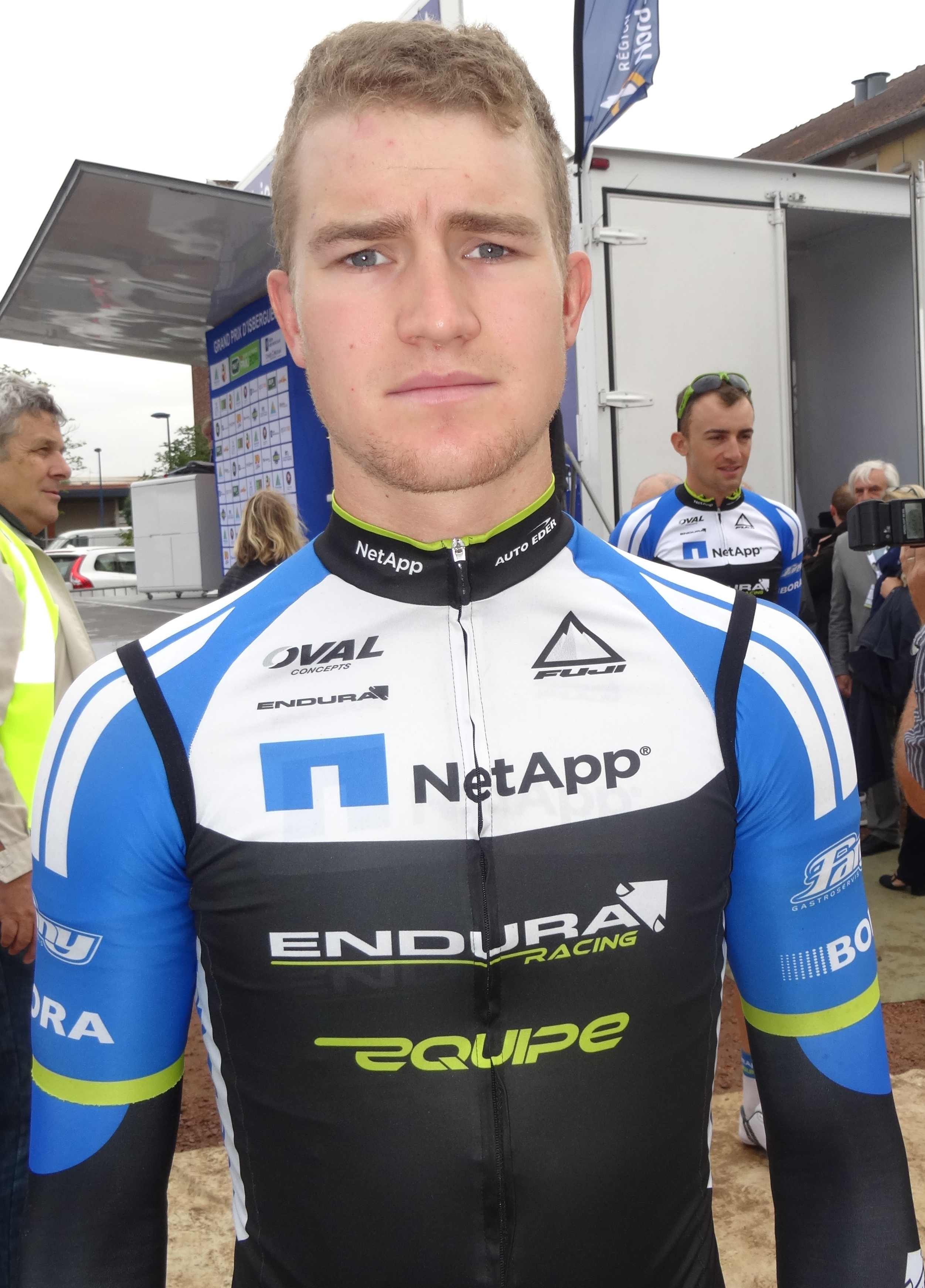 Reportage réalisé le dimanche 21 septembre à l'occasion du départ et de l'arrivée du Grand Prix d'Isbergues 2014 à Isbergues, Nord-Pas-de-Calais, France.